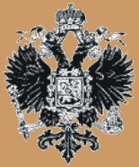 Logo Fabergé 1895